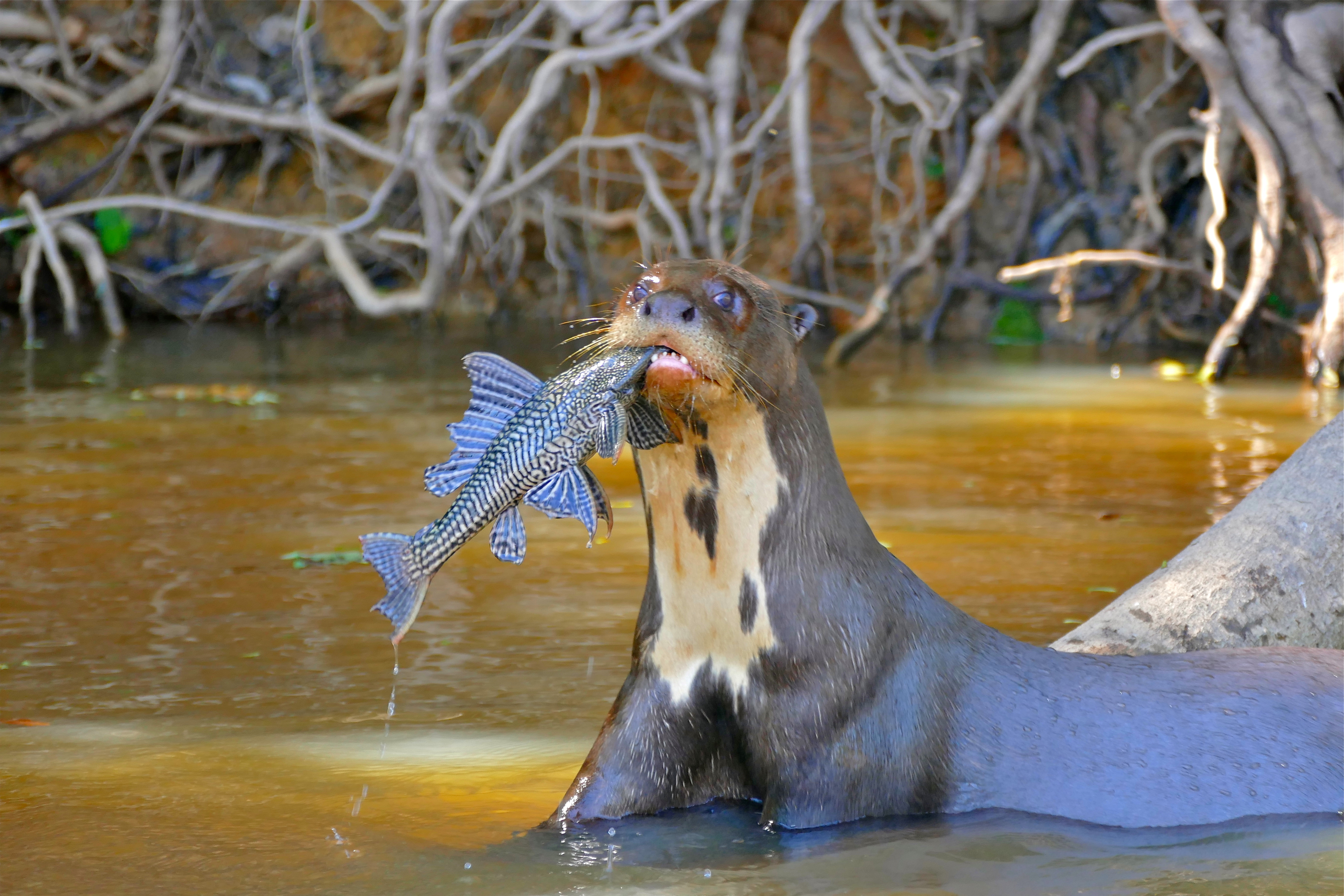 Rio São Lourenço, Porto Jofre, Pantanal, Poconé, Mato Grosso, BRAZIL